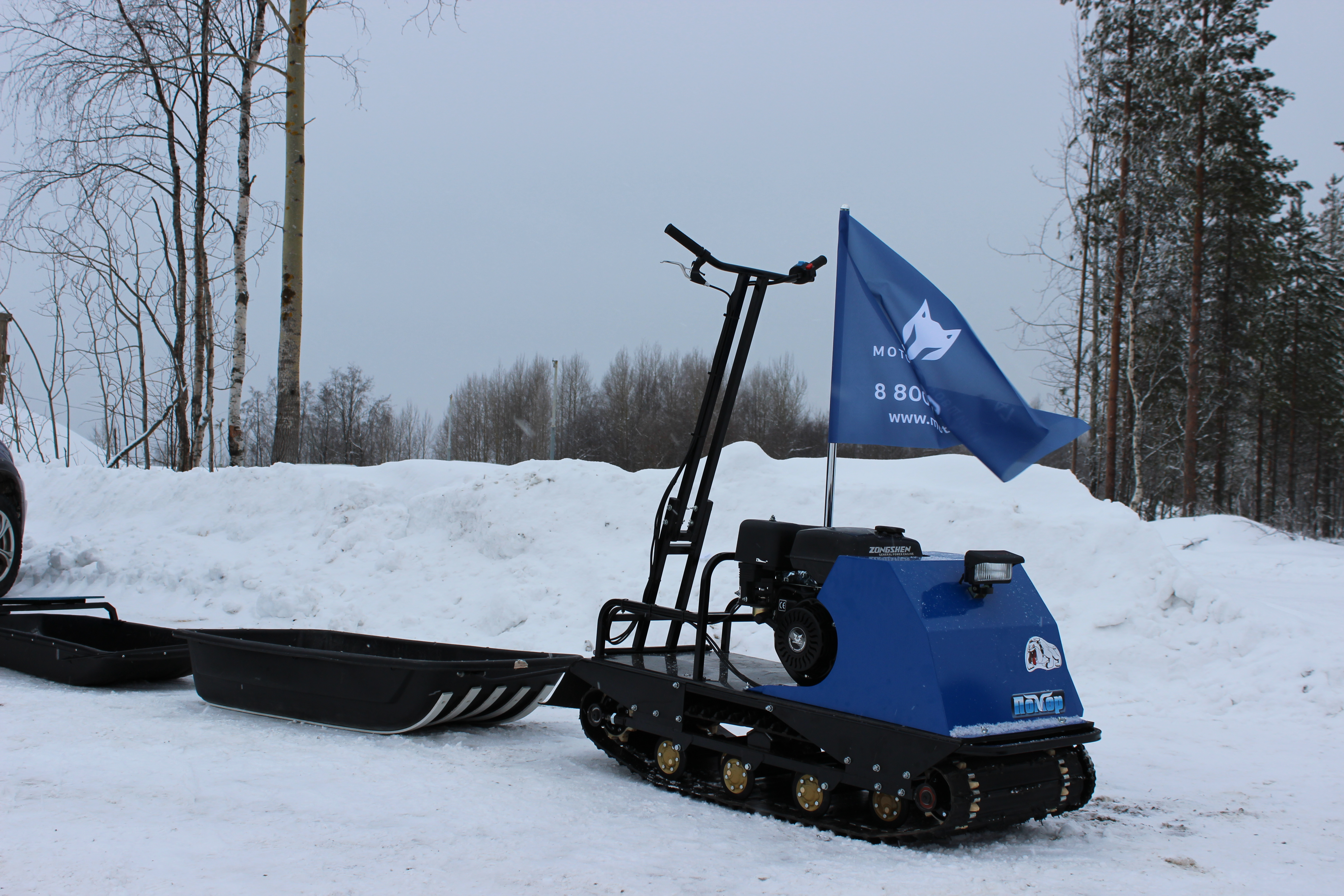 Мотобуксировщик Помор 500 - переднеприводный, катковая подвеска, двигатель бензиновый с вариатором